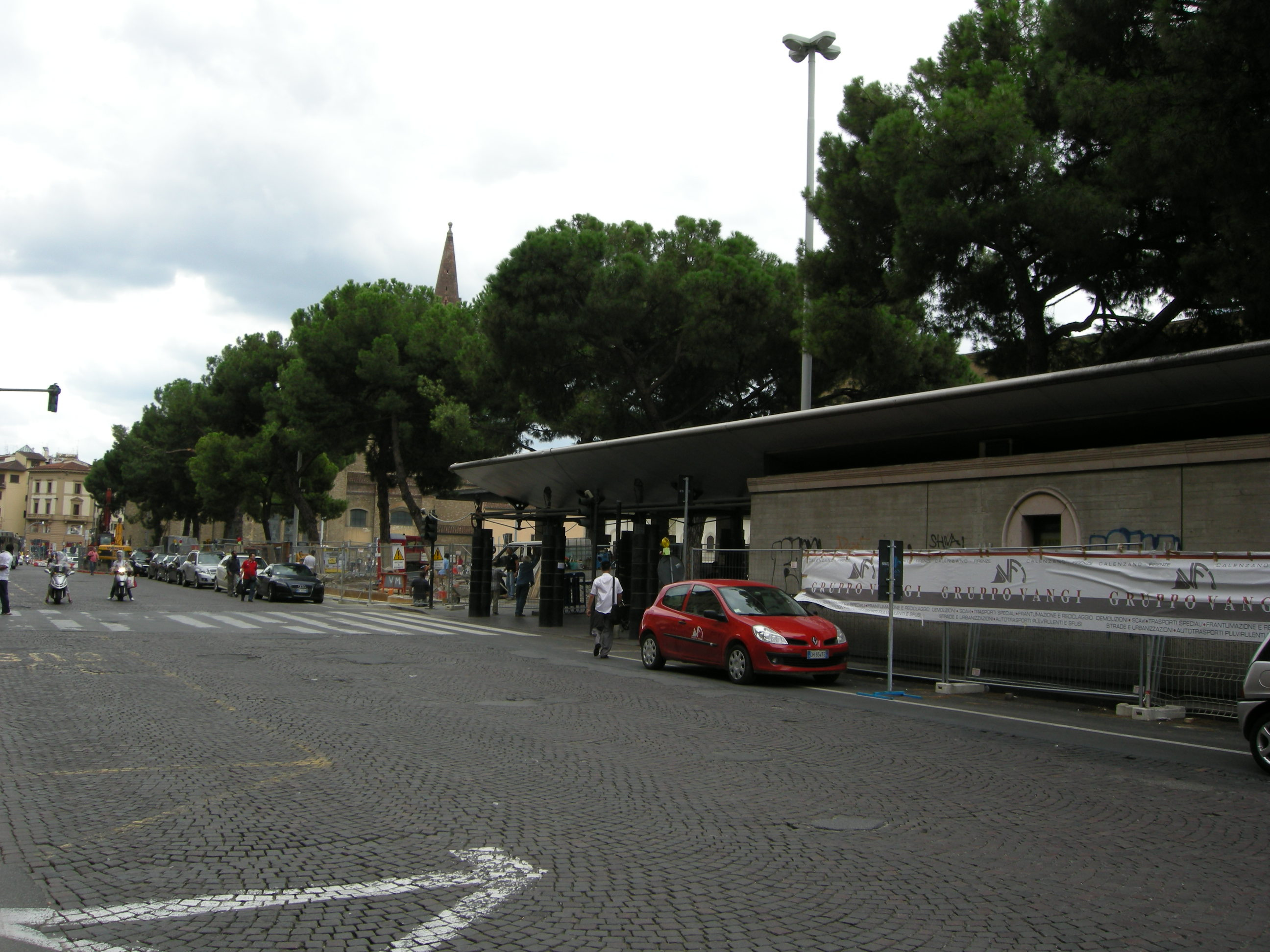 Pensilina della stazione in demolizione